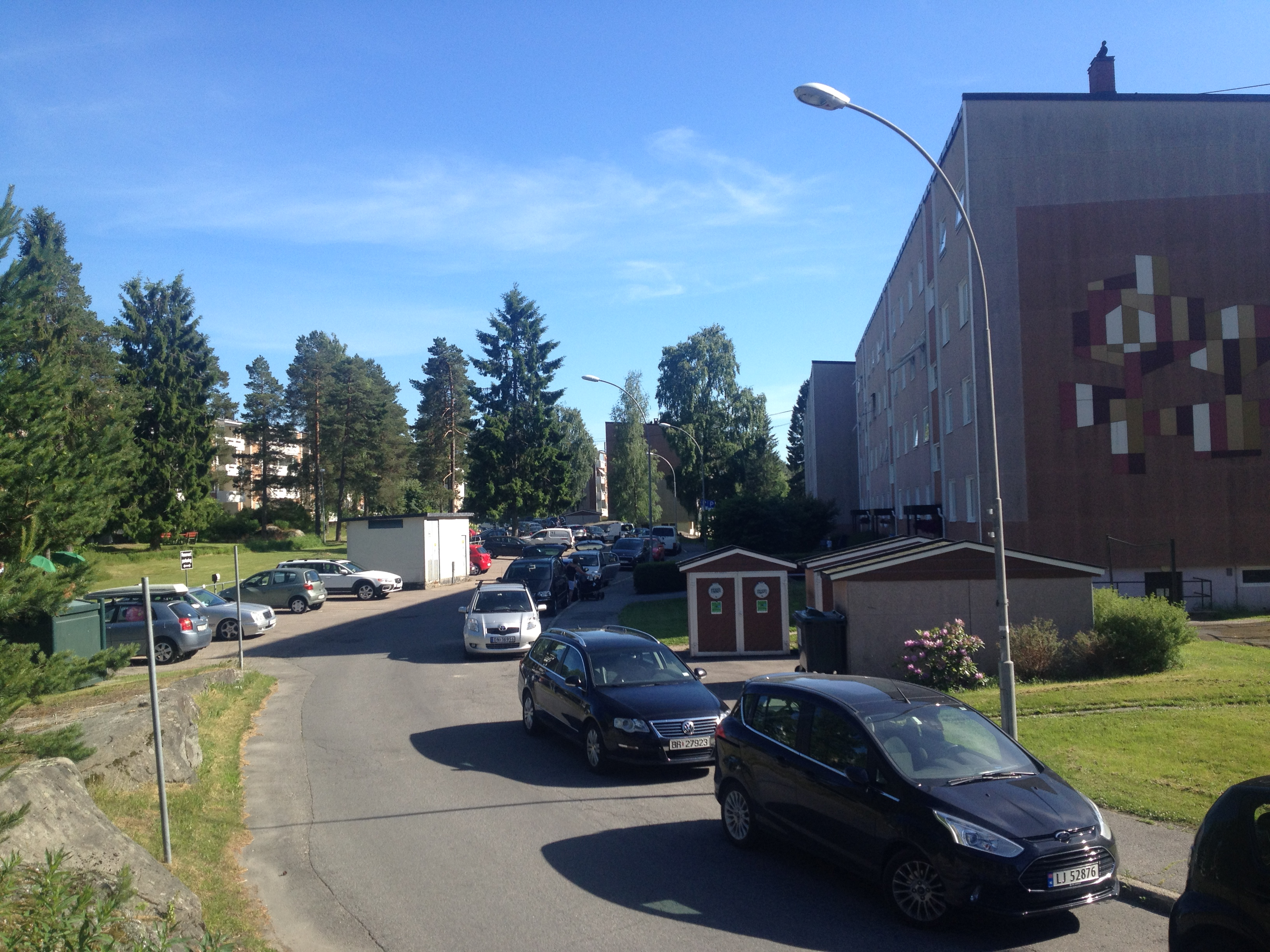 Haraløkka i Oslo